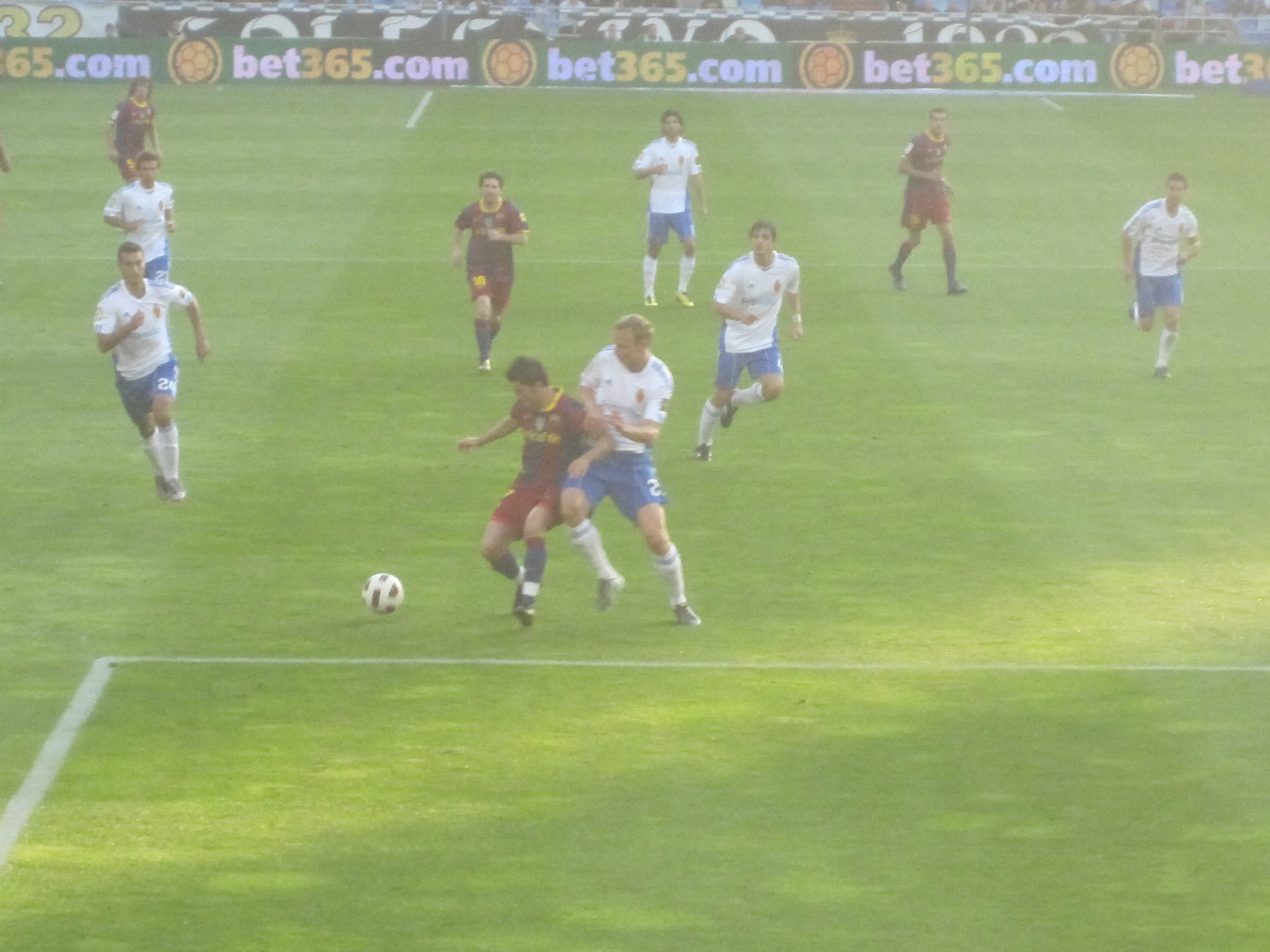 Jarosik con David Villa en octubre de 2010.